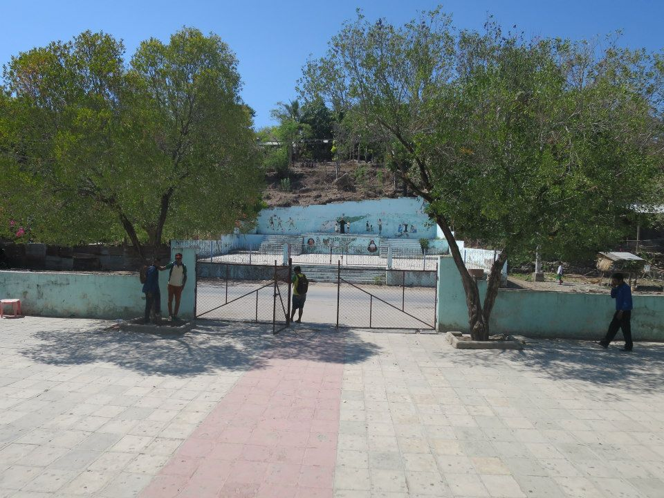 Igreja de S. João Bosco de Laga